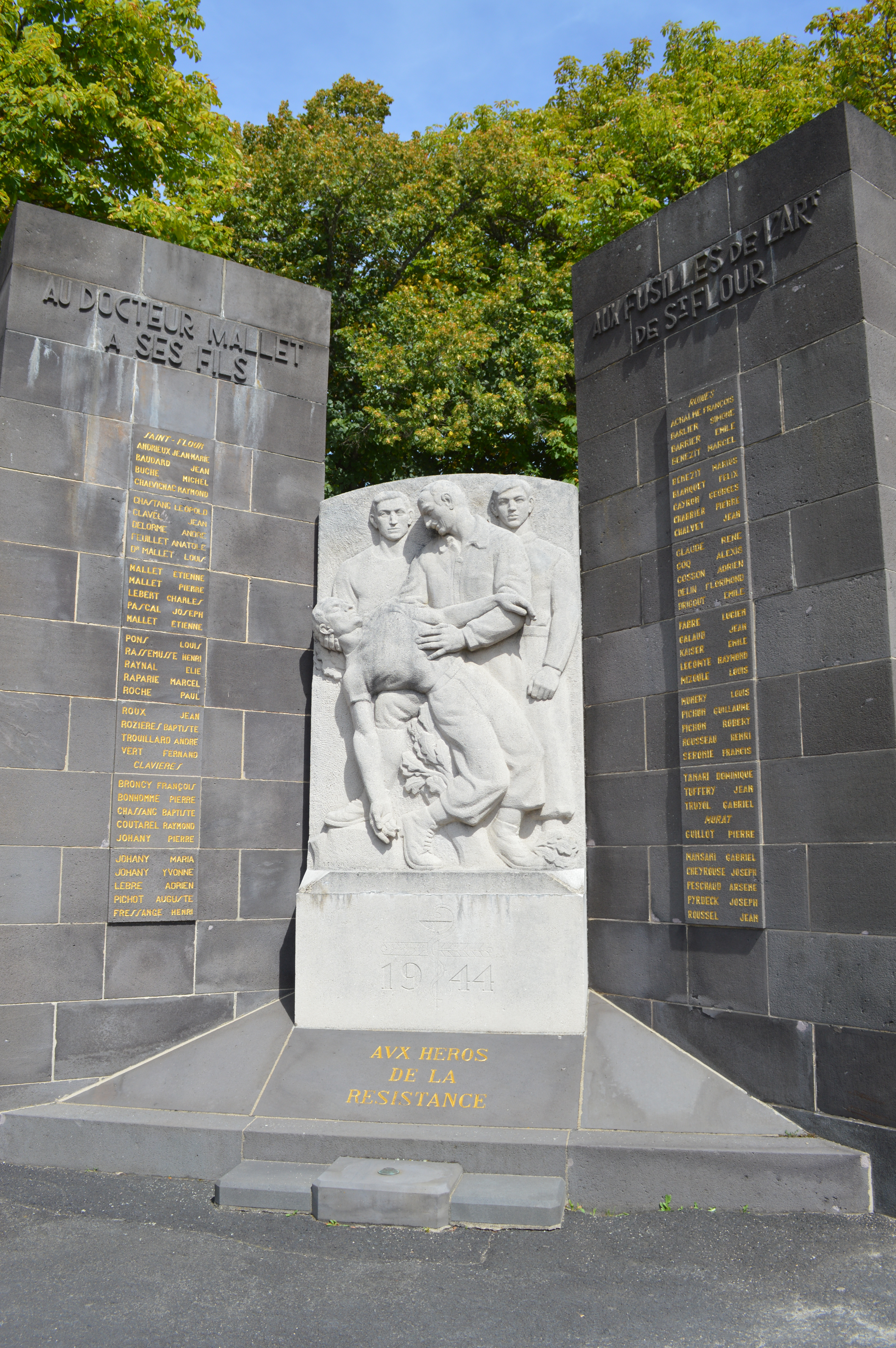 Monument au mort rond point de l'avenue du docteur Mallet